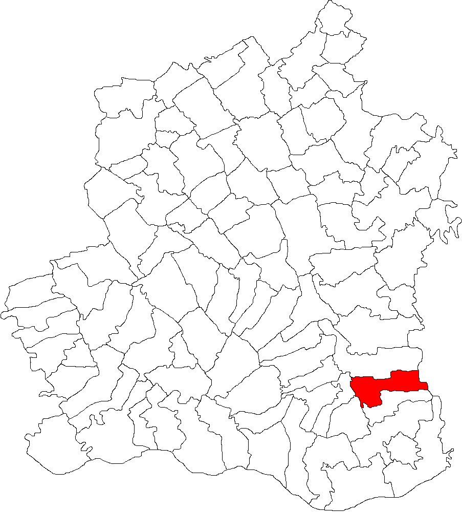 Categorie:Hărţi ale judeţului Teleorman